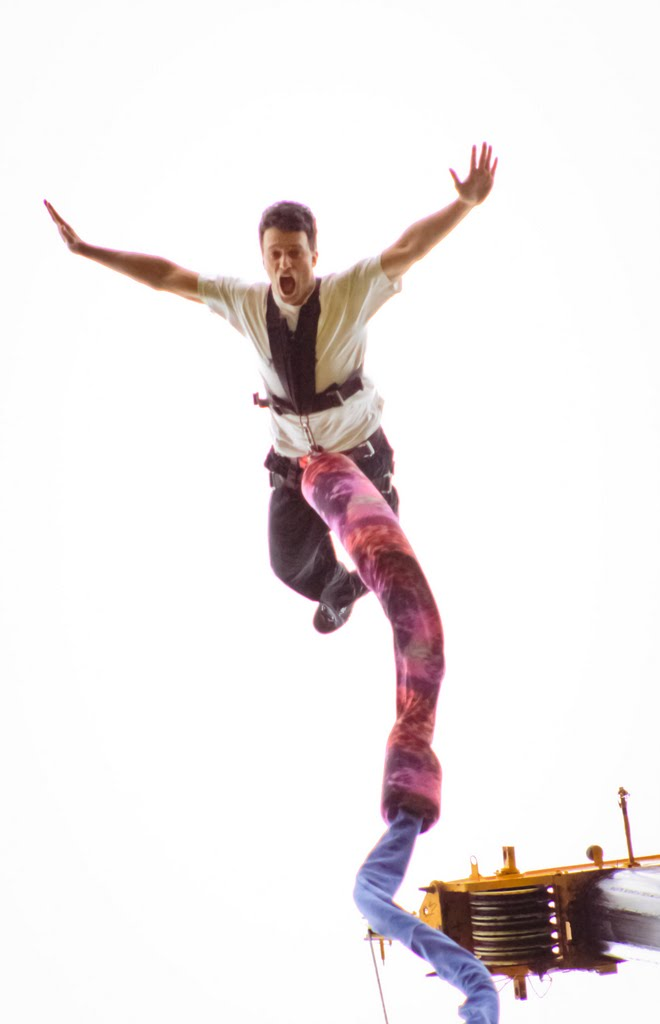 Salto pela cintura frente